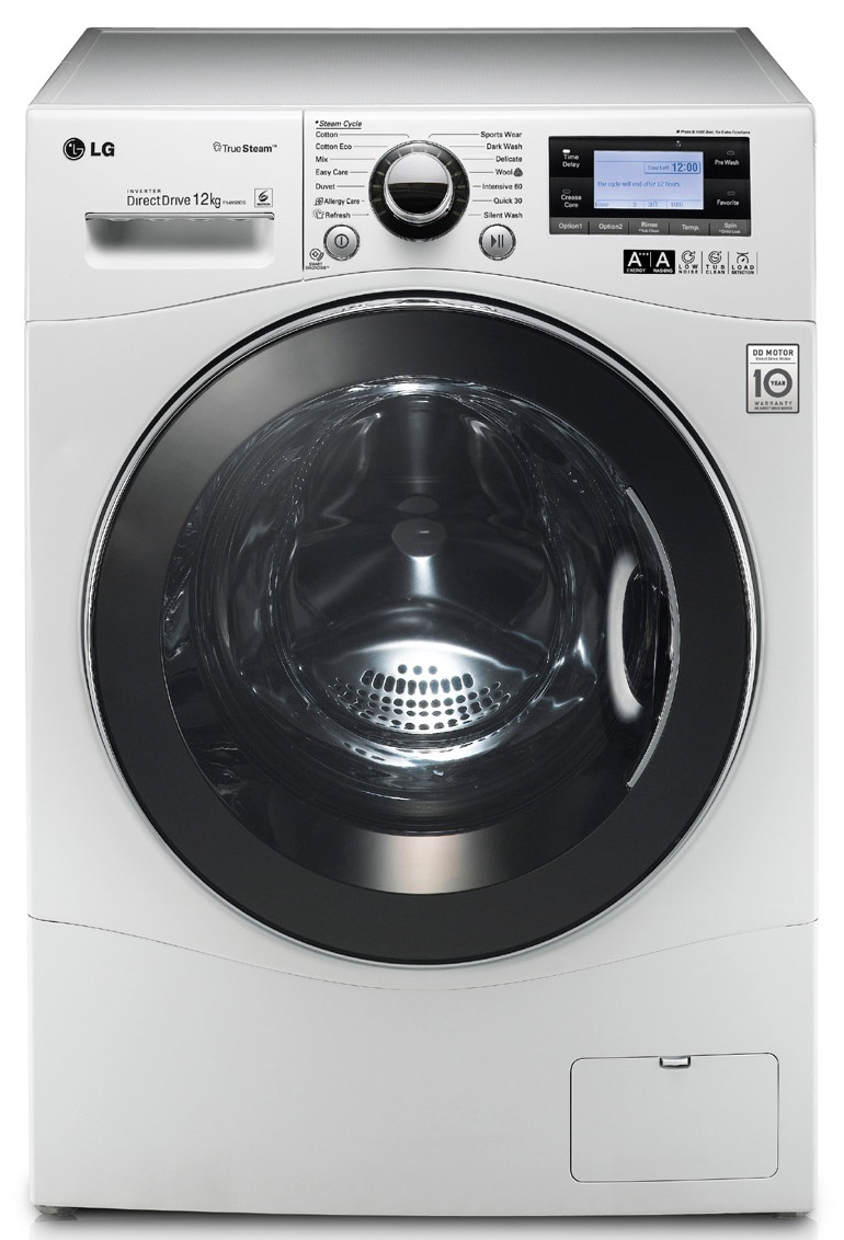 LG전자 세탁기와 식기세척기에 적용된 ‘다이렉트 드라이브' 모터 기술력이 유럽에서 입증됐다. ※ LG전자 뉴스룸 에서 관련 보도자료를 확인실 수 있습니다.